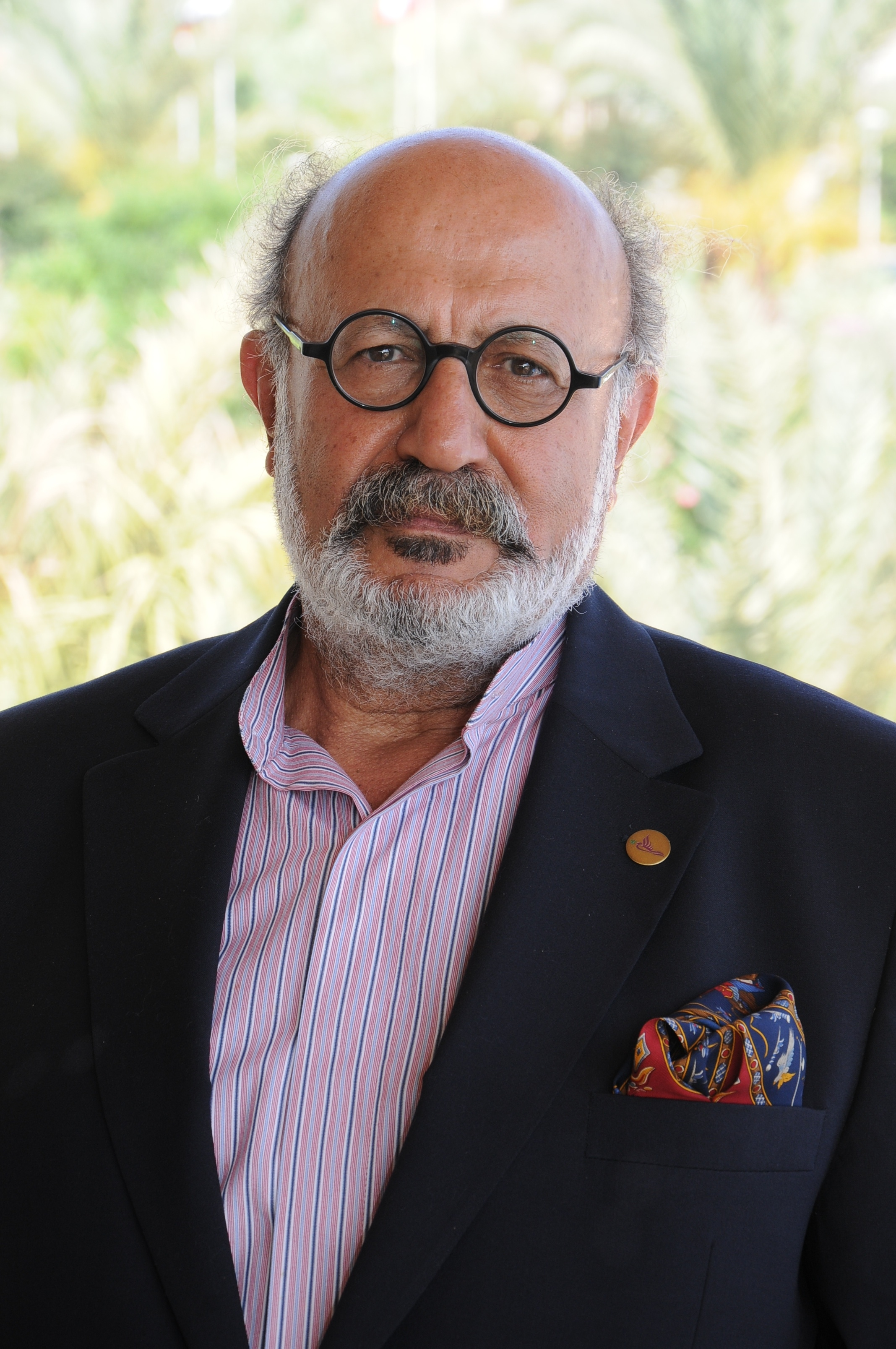 Roger Edde